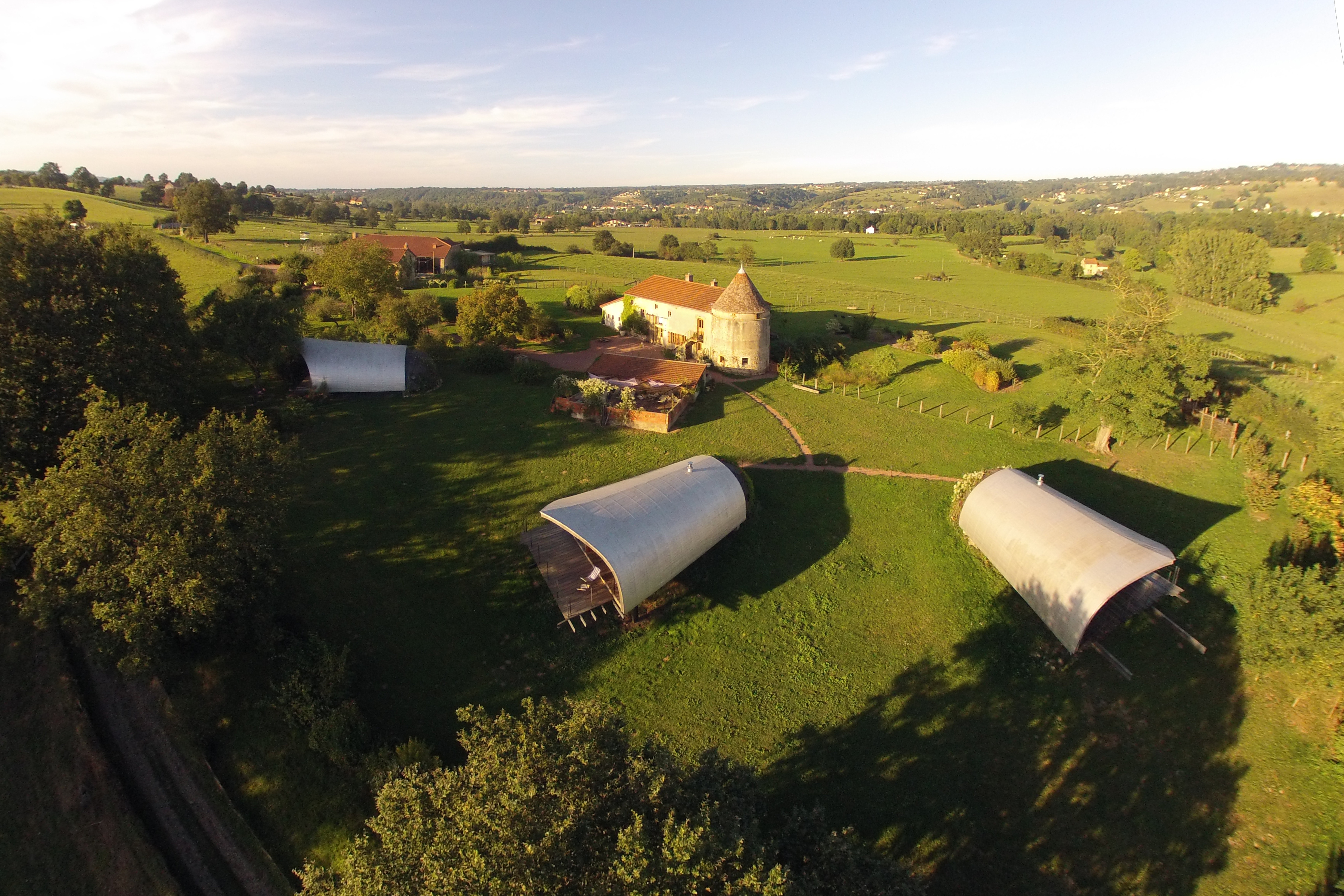 Gîtes et cadoles vue du ciel.